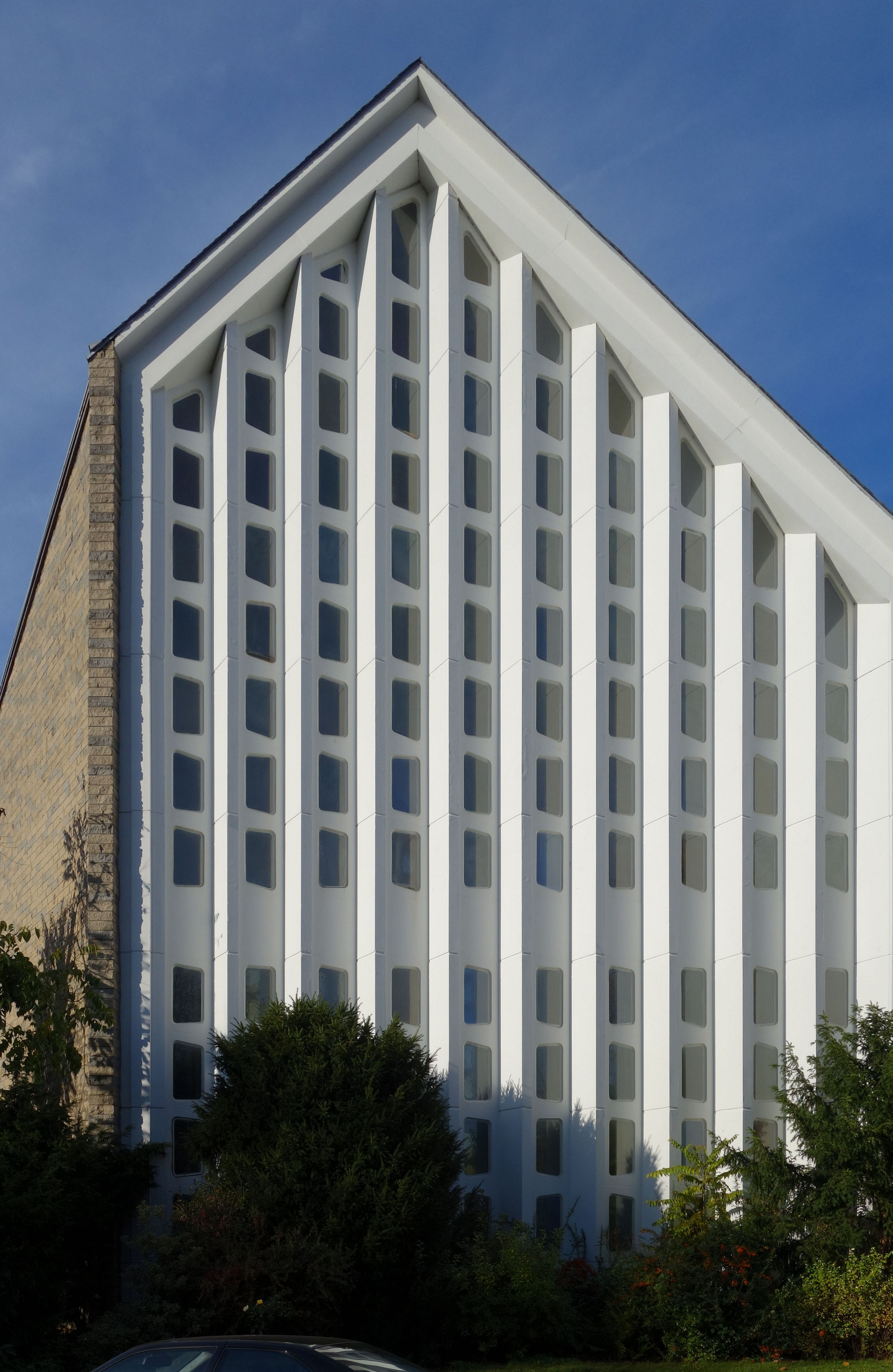 Evangelische Tersteegen Kirchengemeinde, Düsseldorf, 2015.